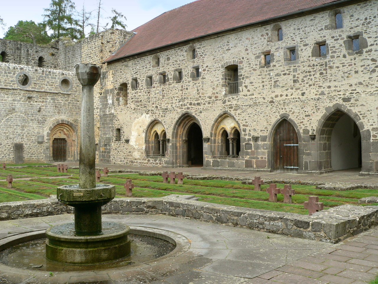 Kreuzgang und Ostbau Kloster Arnsburg bei Lich, Hessen, Germany